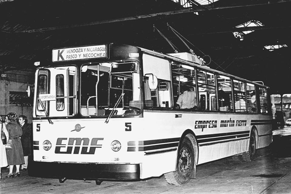 Foto retocada del trolebús ZIU-9 No. 5, puesto en servicio en mayo de 1980, dentro de las instalaciones de la Empresa, por entonces en Av. Pellegrini 2870 (Rosario)